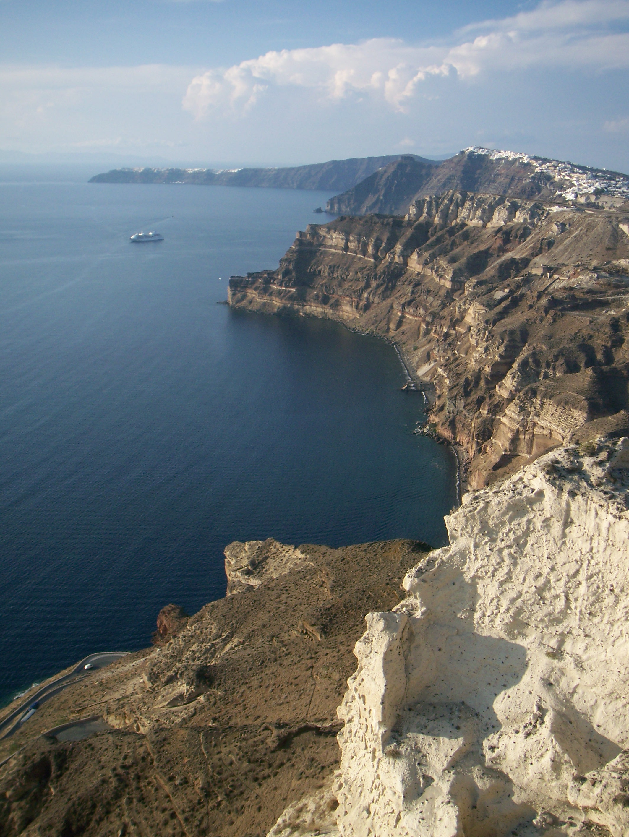 Acantilados de Santorini, pequeño archipiélago circular formado por islas volcánicas, localizado en el sur del Mar Egeo, unos 200 km al sudeste del territorio continental griego. Es también conocida como Thera (o Thira, en griego Θήρα), formando el grupo de islas más meridional de las Cícladas.Santorini